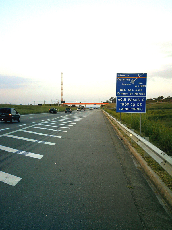 Indicação do Trópico de Capricórnio junto à Rodovia Sen. José Ermirio de Moraes, próximo à Sorocaba, SP - Brasil